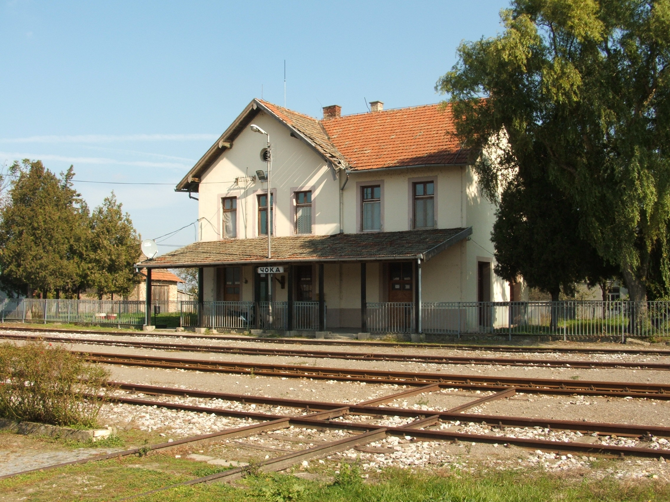 Csóka vasútállomása